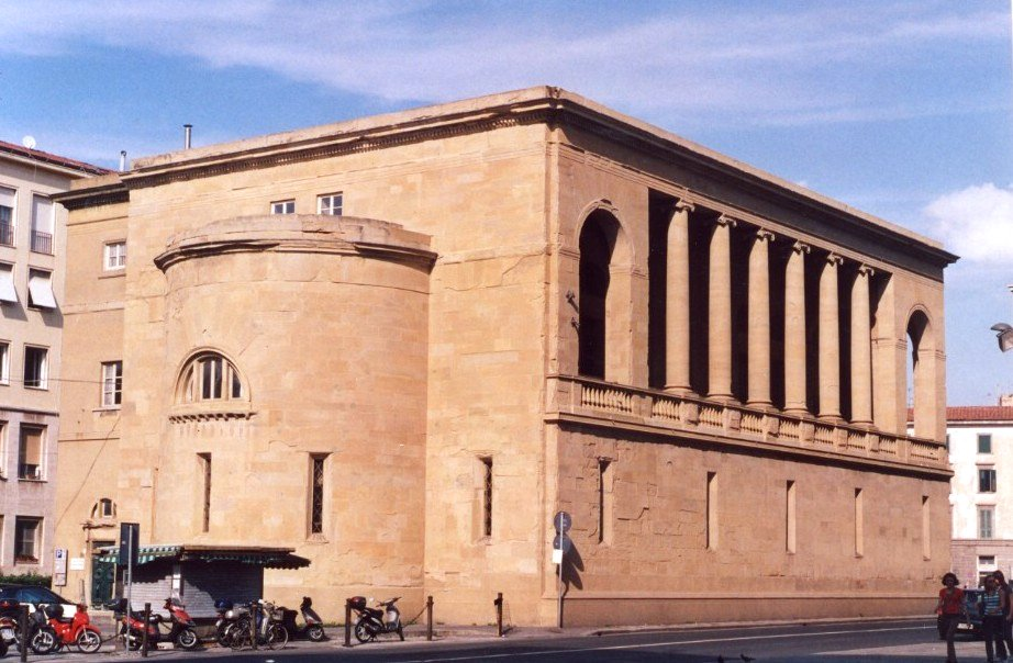 Livorno: il Cisternino di città (XIX secolo), progettato da Pasquale Poccianti per il rifornimento idrico del centro cittadino e mai entrato in funzione. Own work, photo: November 2006